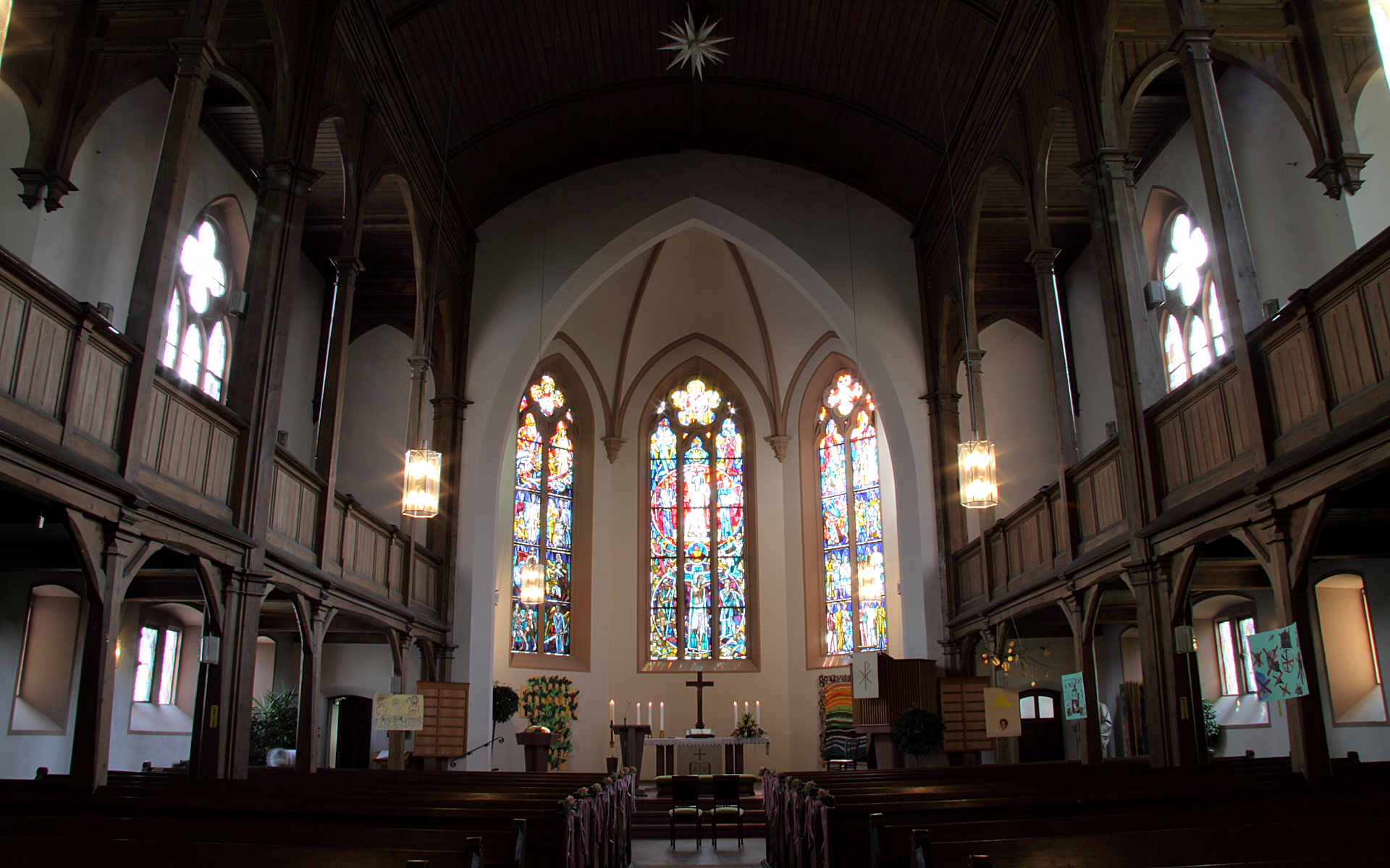 Innenansicht der Johanneskirche in Mannheim-Feudenheim mit Blick auf den Altar